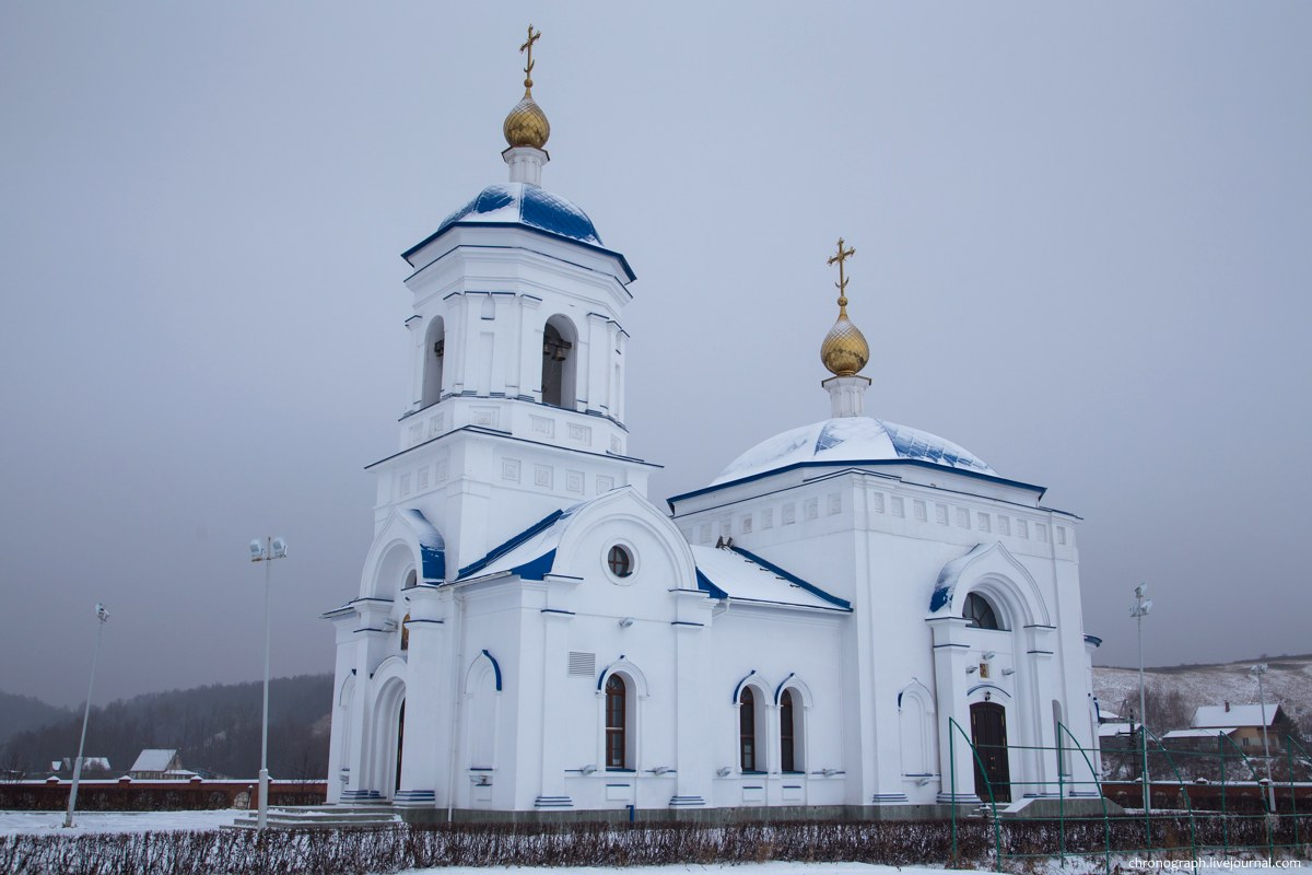 Казанская церковь. Свято-Богородицкий Казанский мужской монастырь. Винновка, Ставропольский район Самарской области